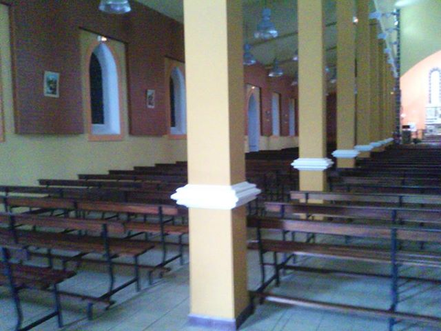 Des piliers et des bancs